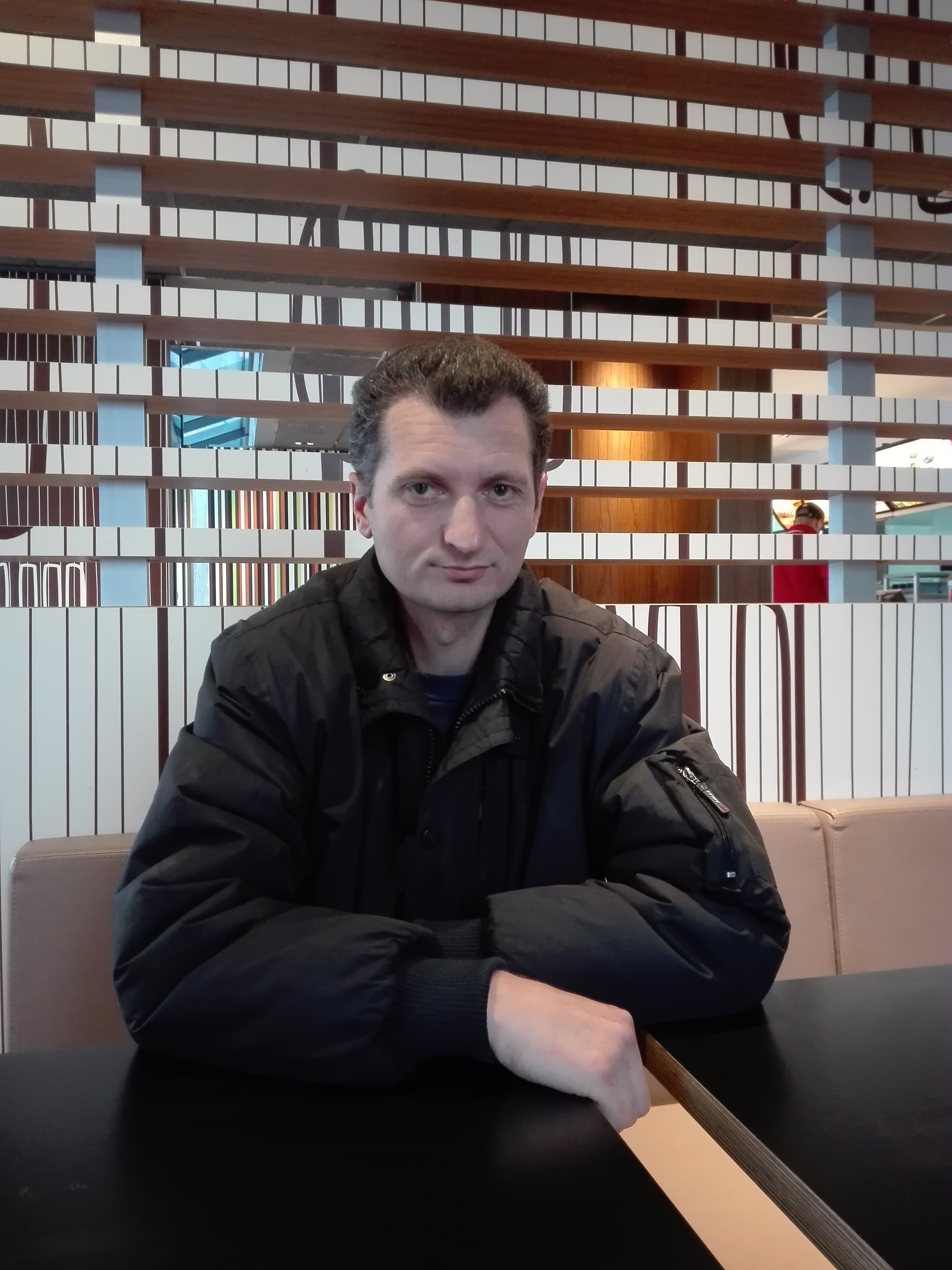 Dragan Stojnić, oktobra 2016, Beograd